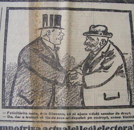 Caricatura cu Vintilă Brătianu la alegerile din 1926, apărută în Evenimentul Zilei